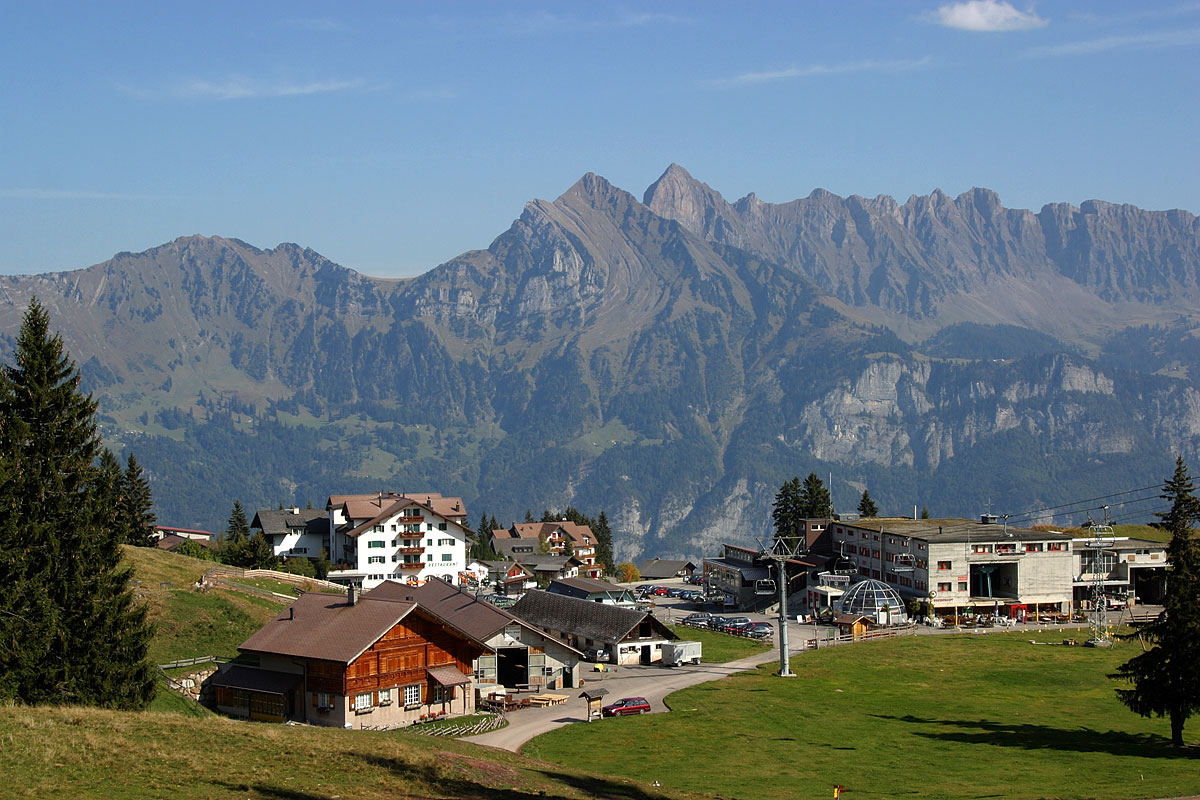 Tannenbodenalp Flumserberg. Bergen von links nach rechts: Sichelchamm (Pyramide in der Bildmitte, 2.269 m.ü.M.), Gamsberg (2.385 m.ü.M.) und Isisizer Rosswis (2.334 m.ü.M.).